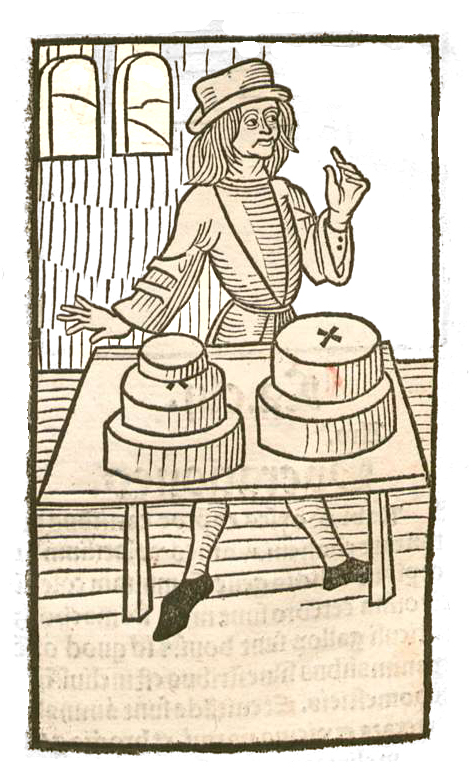 Abbildung zum Kapitel Caseus - Käse